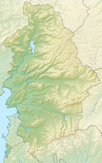 Карта Шкотовского района Приморского края РФ